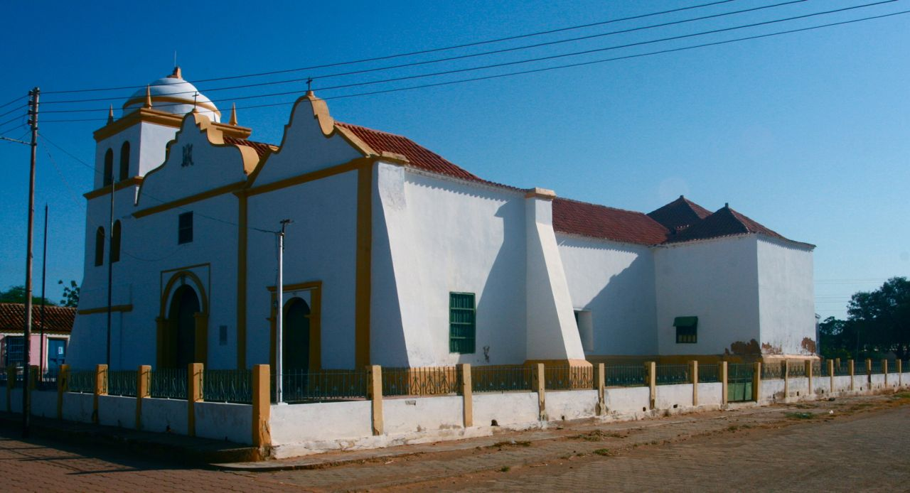 Casigua, municipio de Mauroa, estado Falcón. Iglesia construida en 1779 por órden del Monseñor Mariano Martí. Vista lateral de la iglesia.